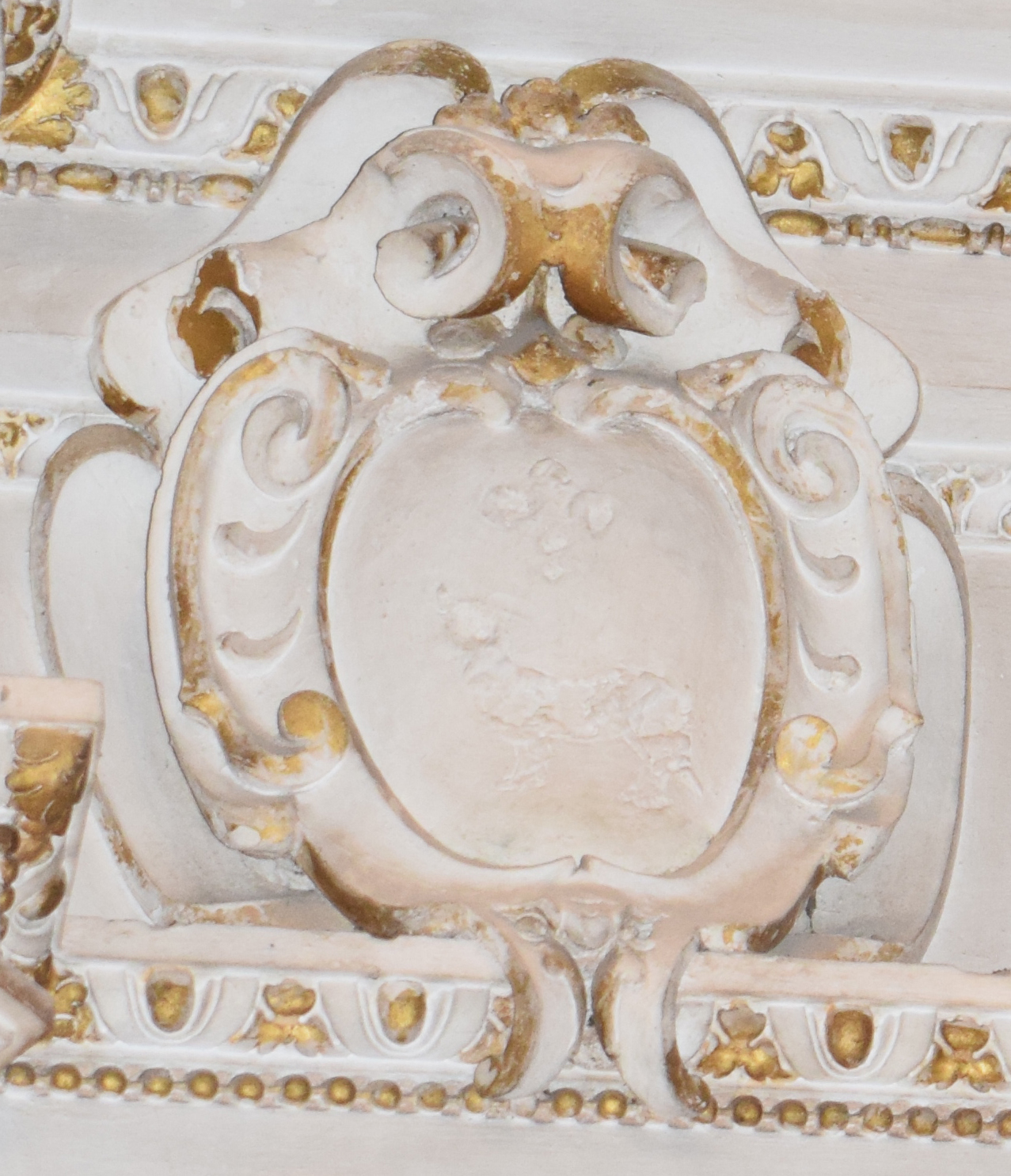 Stemma mutilo negli elementi, dove tuttavia si possono intravedere, nella base, il bove e il giglio( o fiordaliso), elementi araldici della casata dei Tomassoni di Terni.